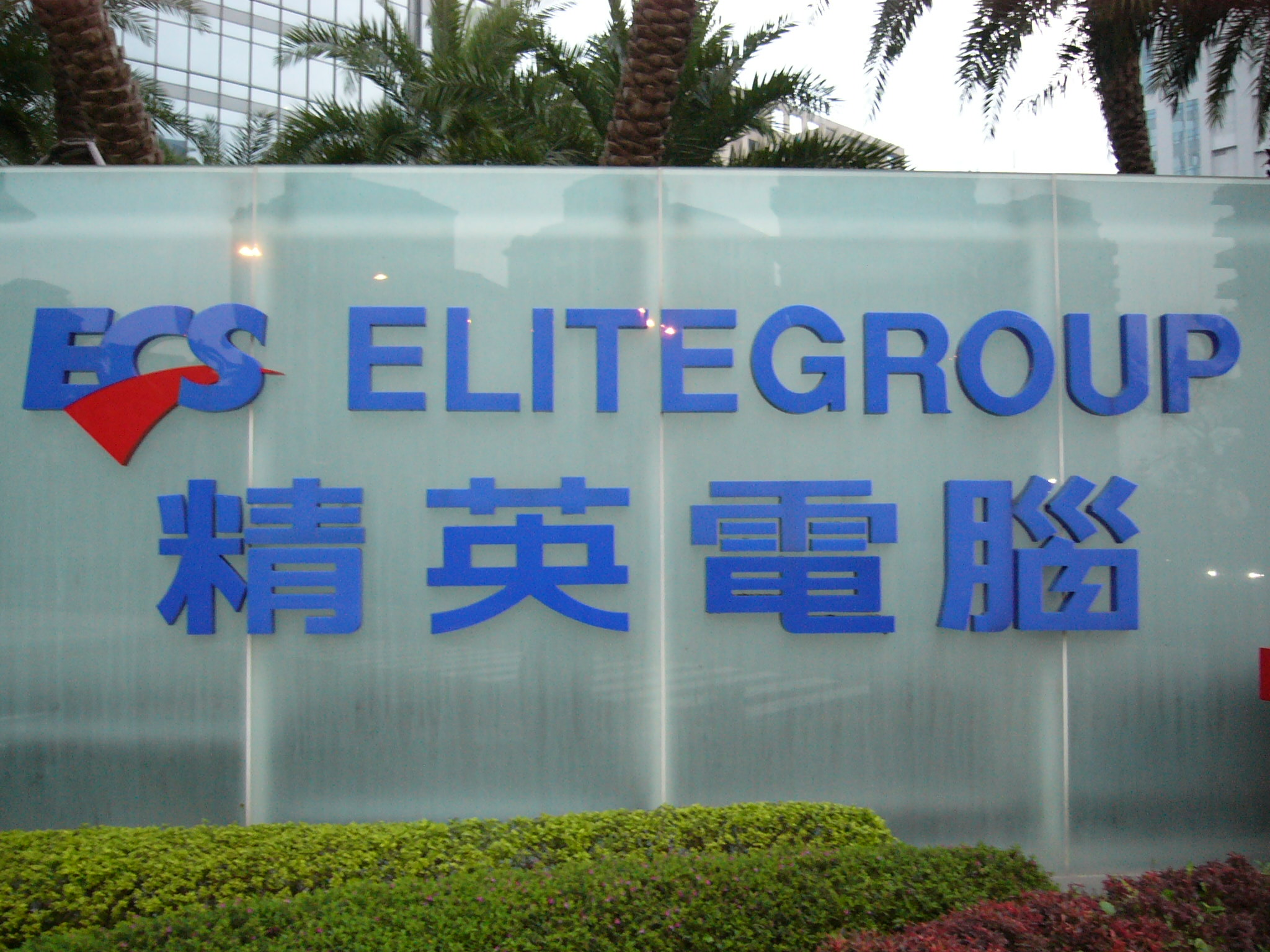 精英電腦總部大樓前庭，精英電腦商標牆。